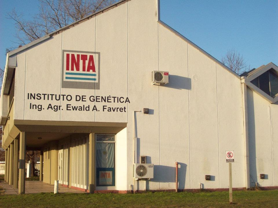 Edificio de la Biblioteca del IGEAF